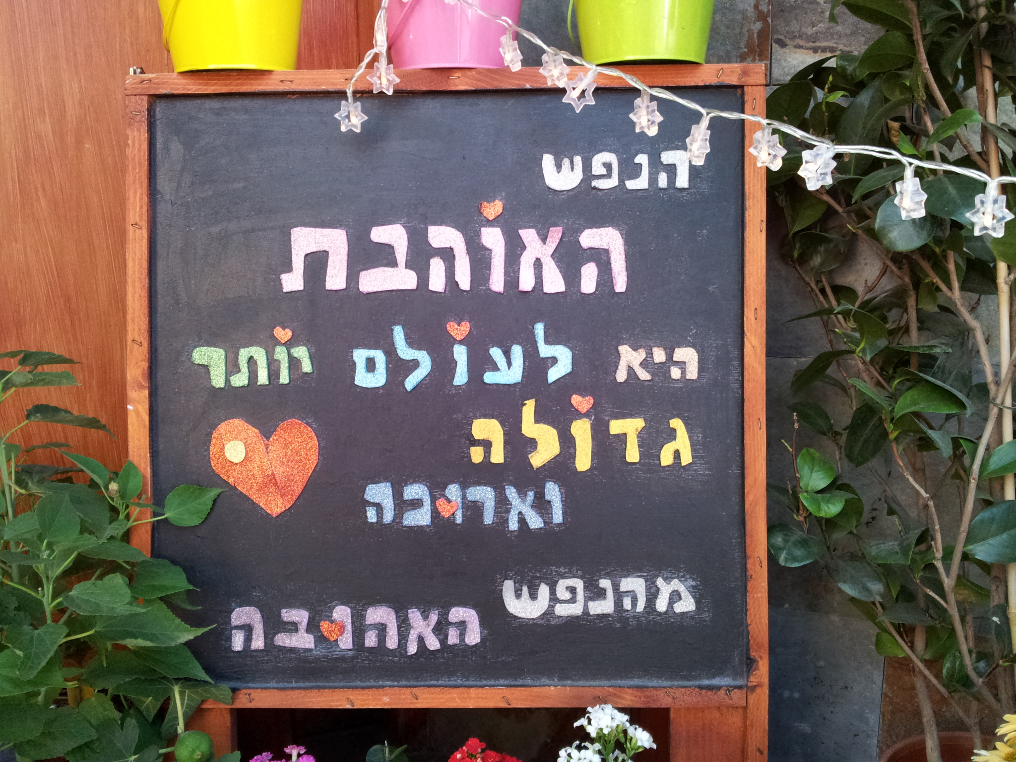 גינון בנווה צדק ברחוב שבזי (2) ושלט